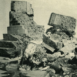 Ruine du premier phare en pierre de la coubre